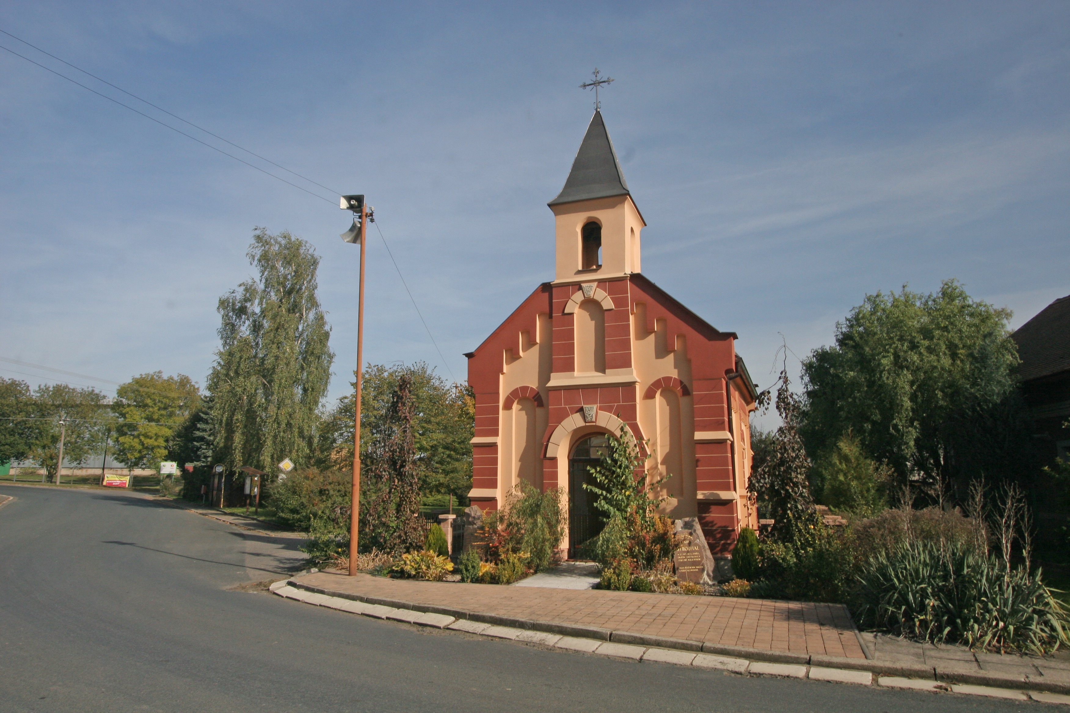 Pomník obětem I. a II. světové války (Jedousov), náves, Jedousov